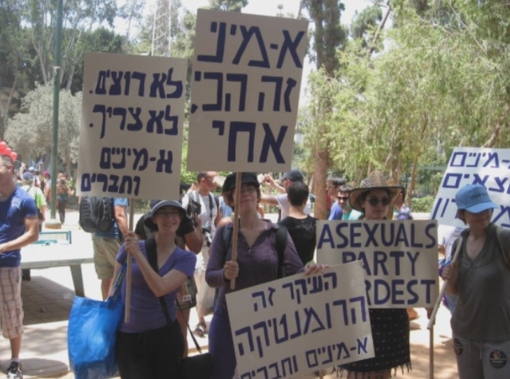 בלוק אסקסואלי במצעד הגאווה תל אביב - 2010